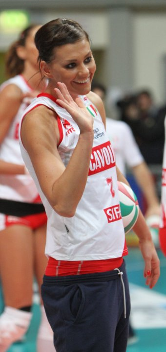 Katarzyna Skowrońska, pallavolista polacca, gioca nel ruolo di opposto